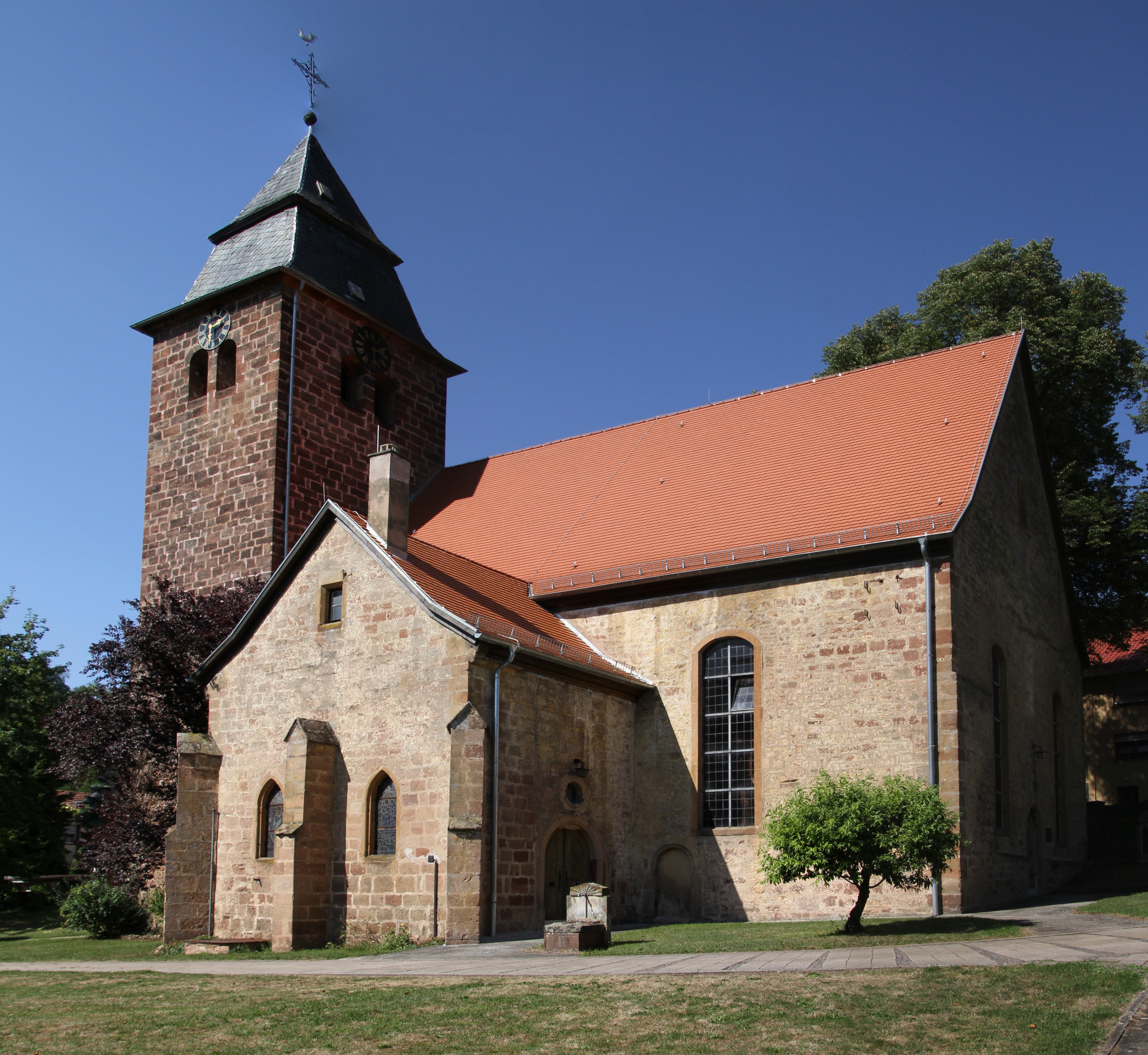 Thaleischweiler, Hauptstraße 59; protestantische Kirche; Saalbau, bezeichnet 1619 und 1620, Unterbau des Westturms sowie Teile der Wände und Arkaden des Vorgängerbaus, zweite Hälfte des 13. Jahrhunderts; Gesamtanlage mit Kirchhof mit Grabsteinen des 18. und 19. Jahrhunderts und Pfarrhaus.